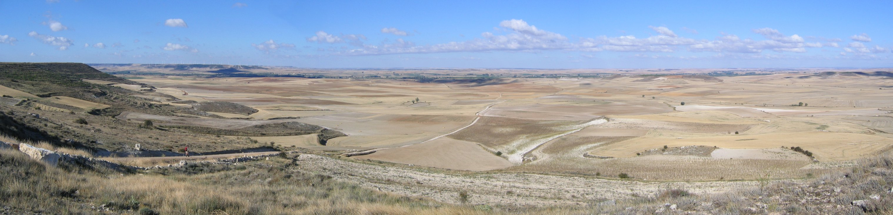 Kastillisches Hochland Meseta im Sept. 2005, selbst fotografiert